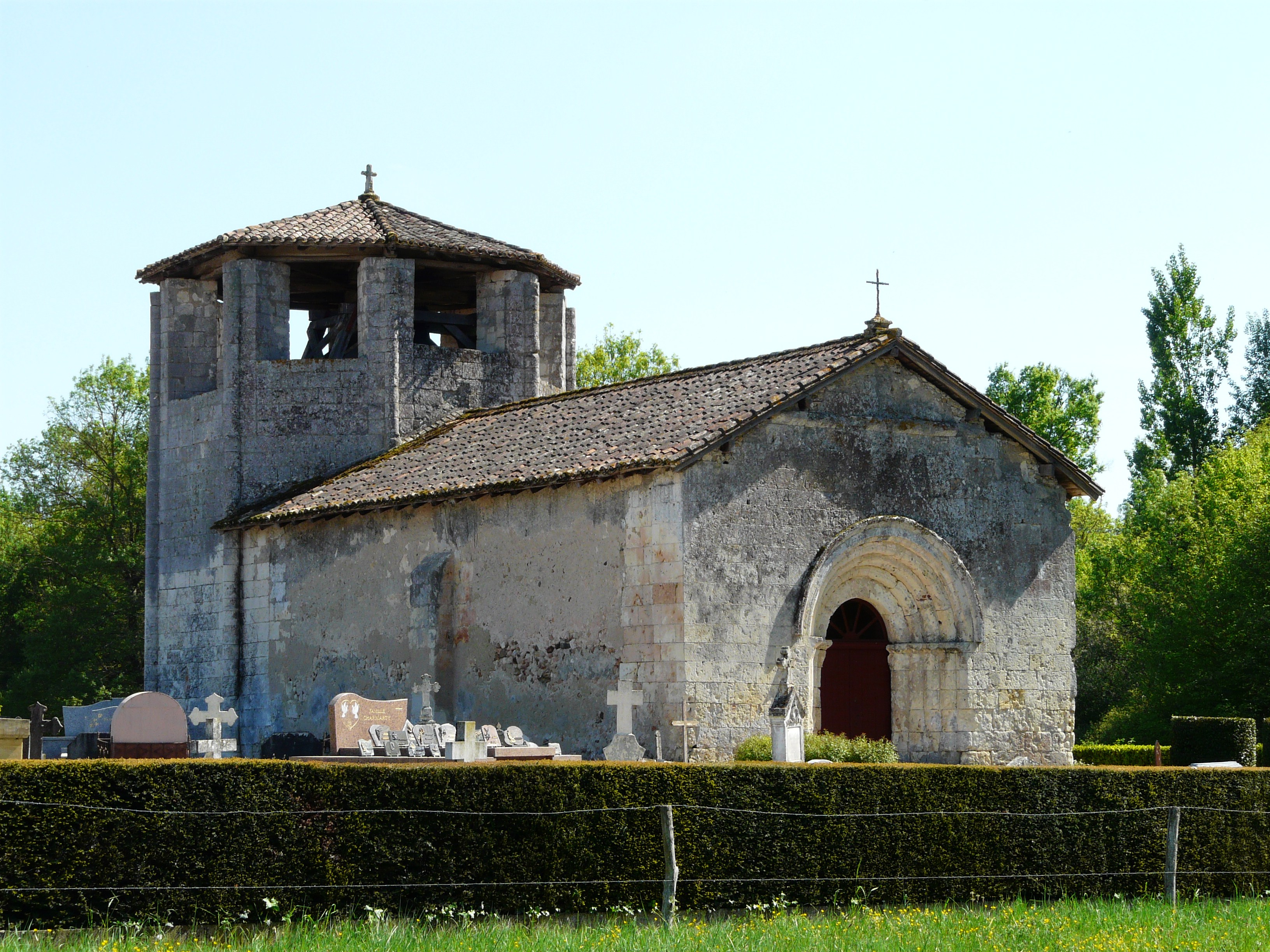 L'église Saint-Martin vue du nord, Saint-Martin-l'Astier, Dordogne, France.